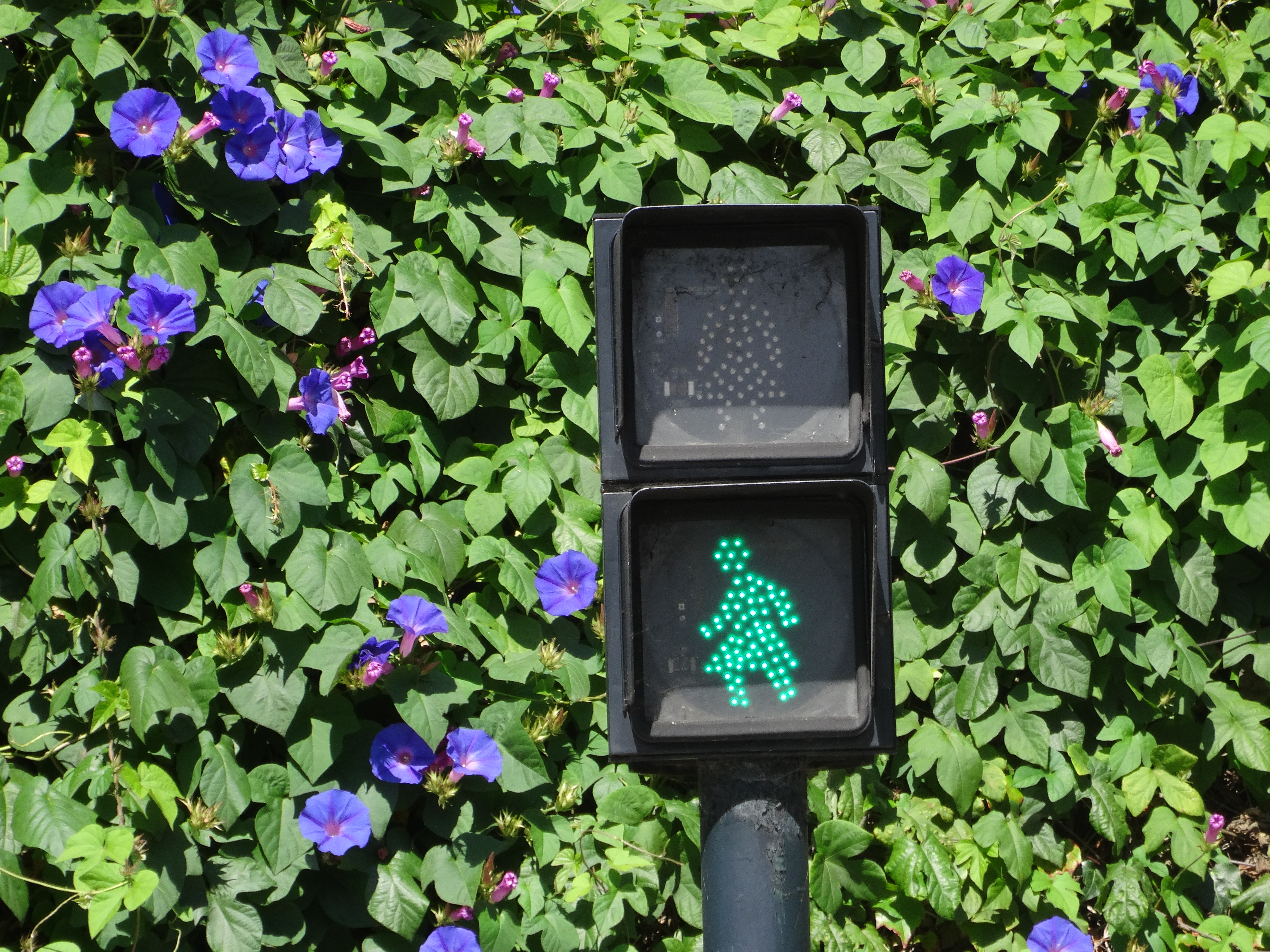 Ver título.